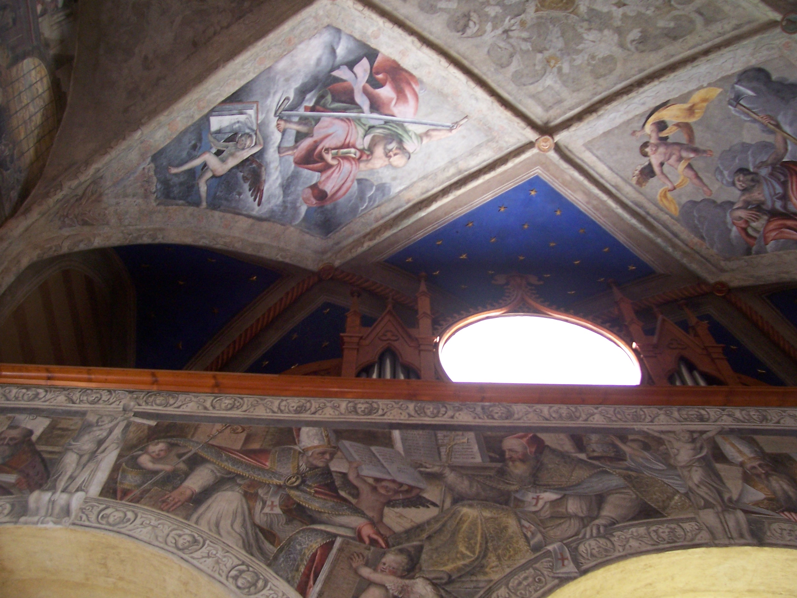 Santissimo corpo di cristo brescia interno6.jpg